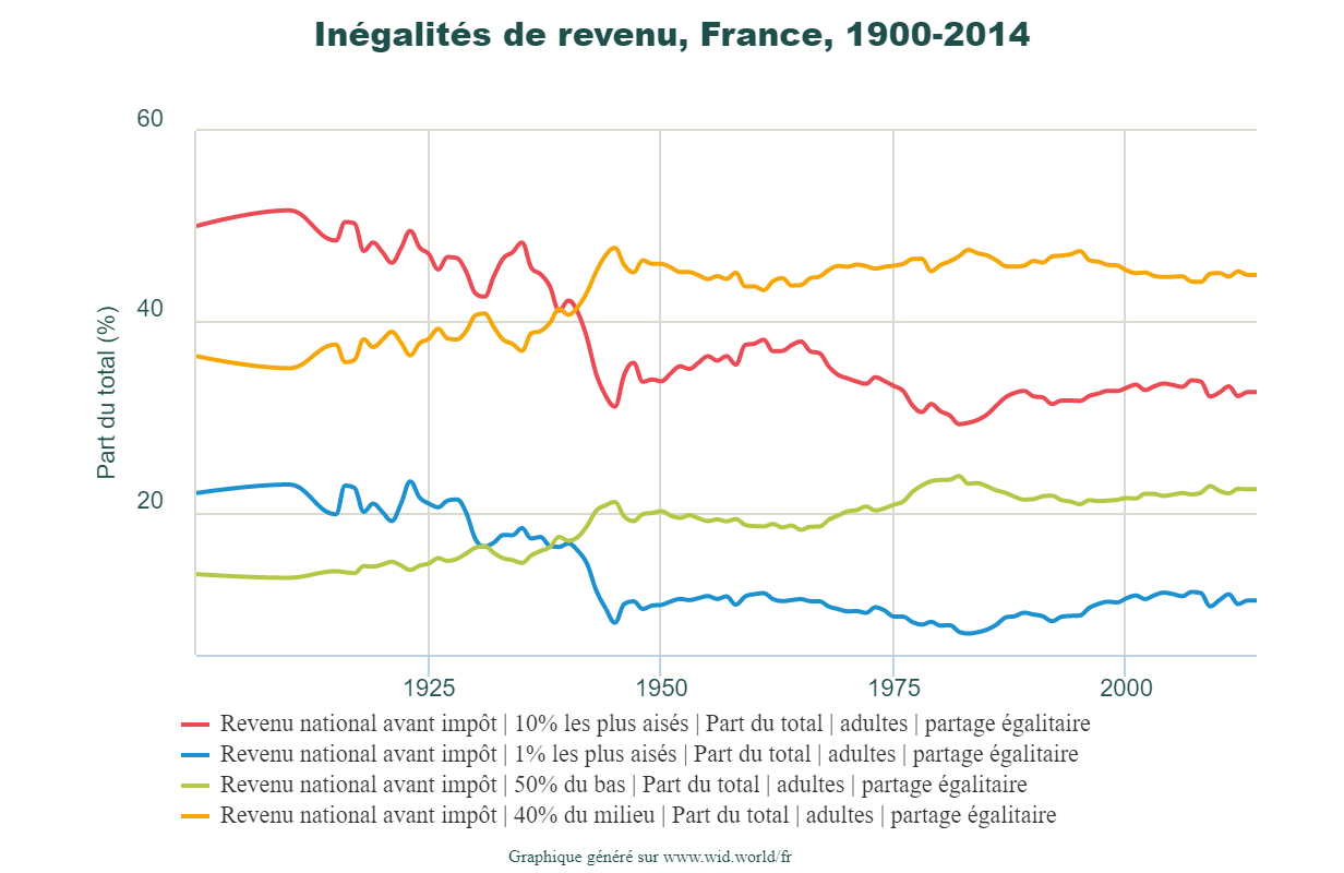 Inégalités de revenus en France, 1900-2014, World Inequality Database